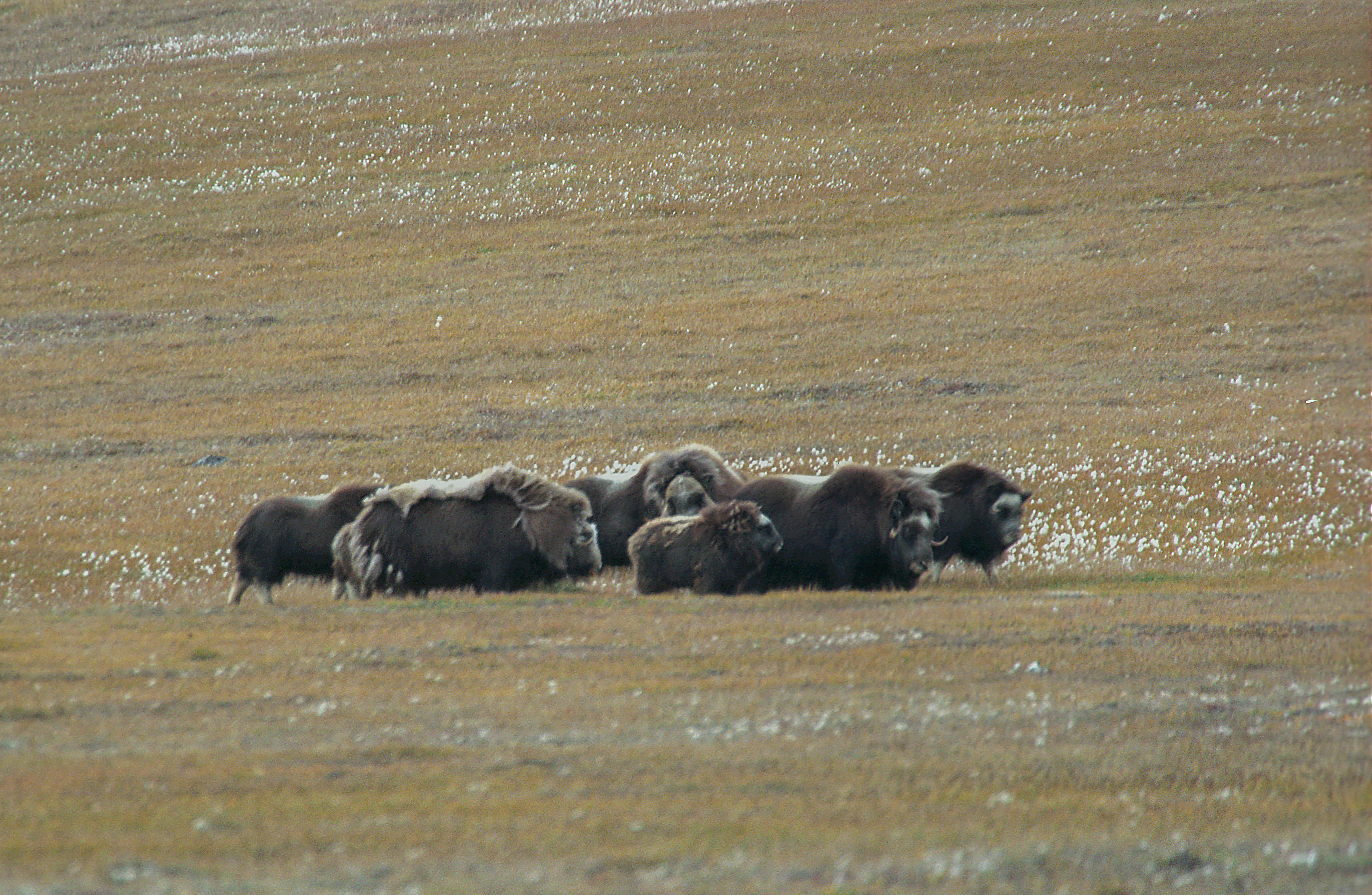 Greenland, musk oxes